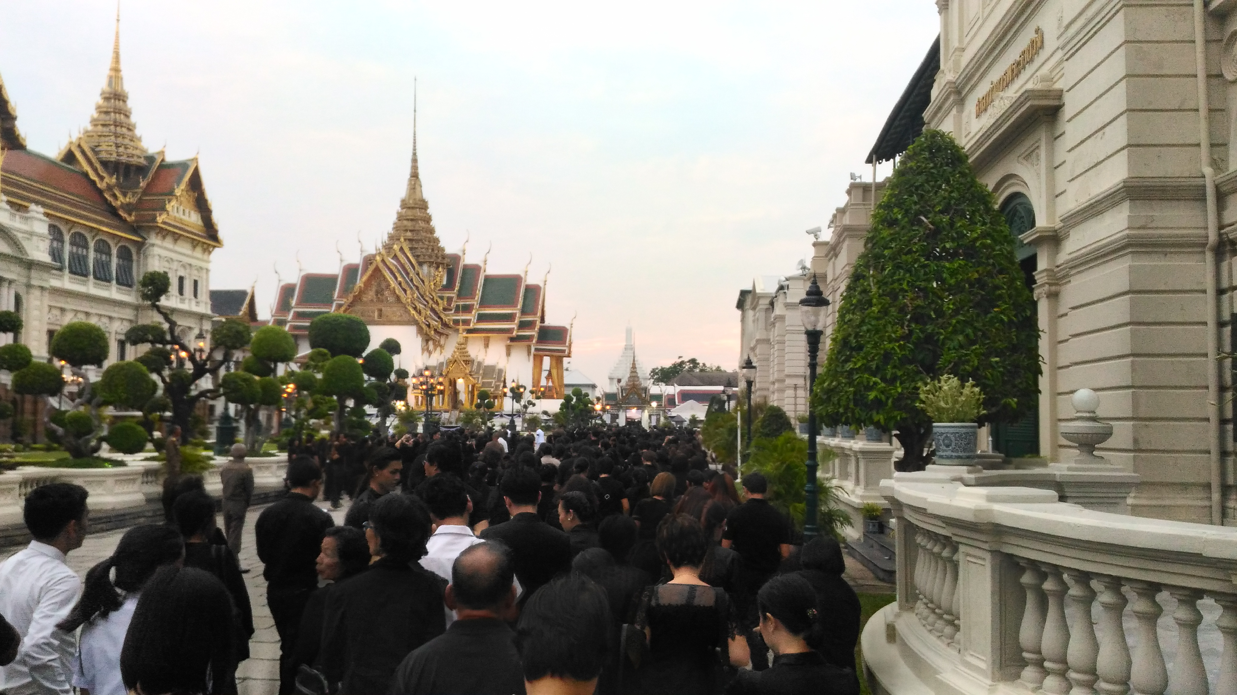 ประชาชนต่อแถวเพื่อรอเข้าสักการะพระบรมศพ พระบาทสมเด็จพระปรมินทรมหาภูมิพลอดุลยเดช สยามินทราธิราช บรมนาถบพิตร ซึ่งประดิษฐาน ณ พระที่นังดุสิตมหาประสาท ในพระบรมมหาราชวัง กรุงเทพฯ บันทึกภาพเมื่อวันที่ 23 มกราคม พ.ศ. 2560